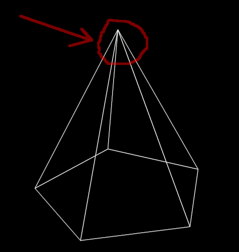 Pārkakts, kurā savienojās piecas šķautnes